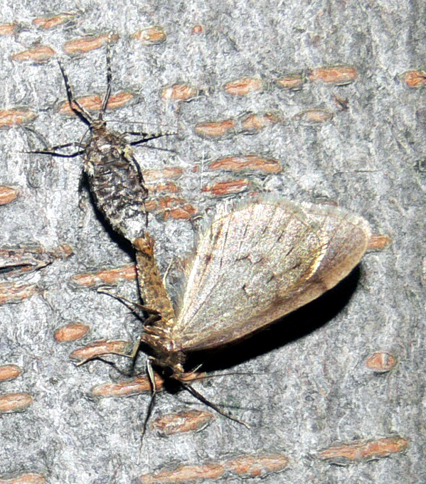 Operophtera brumata L. ou phalène brumeuse ou cheimatobie ou ou "Cheimatobie hiemale" ou phalène hiémale ou petite phalène hiémale ou arpenteuse tardive est un papillon de nuit de la vaste famille des Geometridae. Cette espèce des régions tempérées vit sur les arbres forestiers, les vergers ou dans les jardins. Elle n’est active que la nuit et au crépusculaire. Elle était très abondante en Europe et Europe de l'est jusqu’au 19ème siècle, et elle reste relativement courante dans les environnement très arborés. Comme Erannis defoliaria ("Hibernie défoliante"), autre espèce dont les chenilles défolient les arbres, c’est un des très rares lépidoptères dont les adultes se cherchent et se reproduisent en plein hiver, d'Octobre à Février, lorsque les températures sont toutefois au dessus de 5°C (et plutôt entre 10 et 15°C pour la copulation, que l’on observe souvent sur des arbres ou un mur éclairé par un lampadaire, ce papillon étant attiré par la lumière artificielle). source : F. Lamiot (own work) Tanslation: Description: Operophtera brumata L .....is a moth from the big family Geometridae This species of the temporate regions lives in the trees of the woods, orchards or gardens. It is active only in the night and in the dawnings. It was quite abundante in Europe and Eastern Europe till the 19th century, and it stays common in woody regions. Like Erannis defoliaria, another species, whose caterpillars defoliate trees, it belongs to the quite rare lepidoptera, whose adults are mating and reproducing in winter, from October to February, when the temperature is rather more than 5° (or better between 10° and 15°C for mating, what can be seen on the trees or an walls that are lightened by a lamp, because the moth is attracted by artificial light). Source: F. Lamiot (own work).